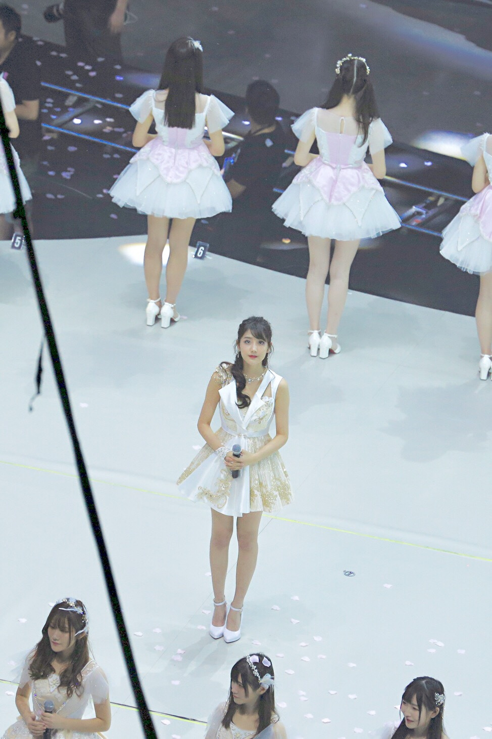 170729总选实图 像星星一样闪亮✨ 是光